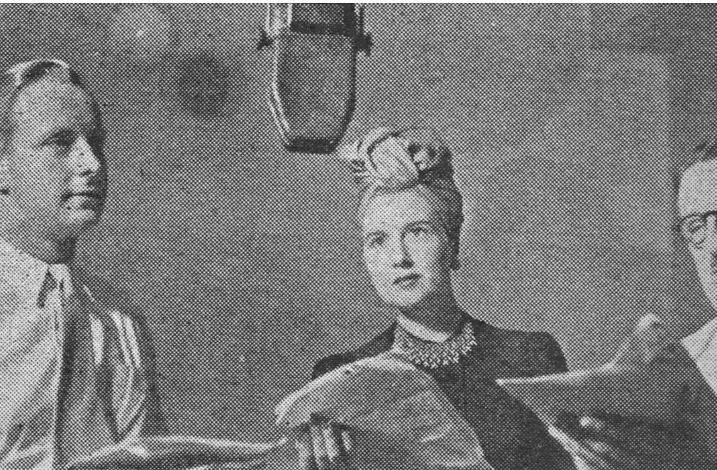 הקלטת תוכנית באולפני ירושלים. פורסם בחוברת "הגלגל" בתאריך 11.10.1945.